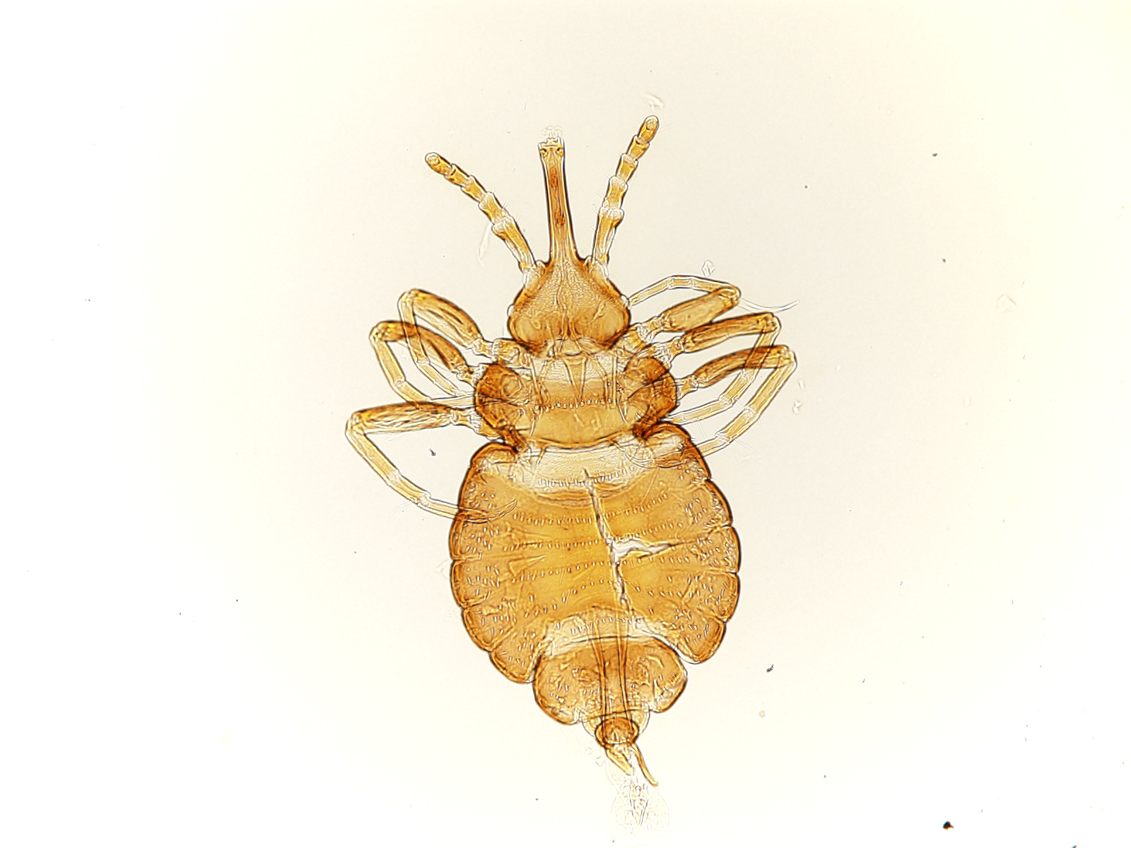 ex. Asian elephant